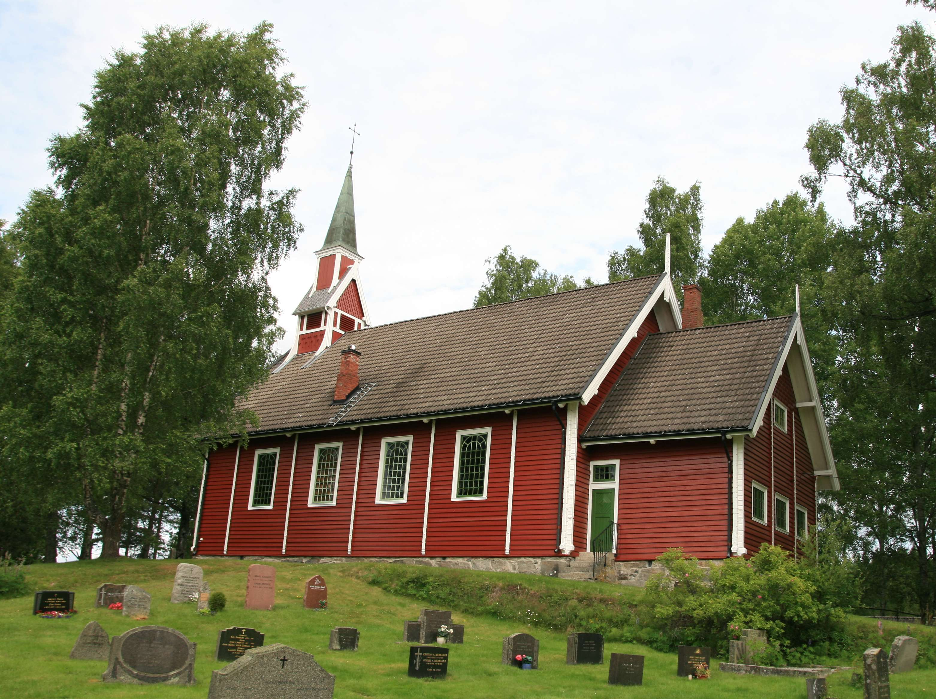 Holmegil kirke er en langkirke fra 1902 i Aremark kommune, Østfold fylke.